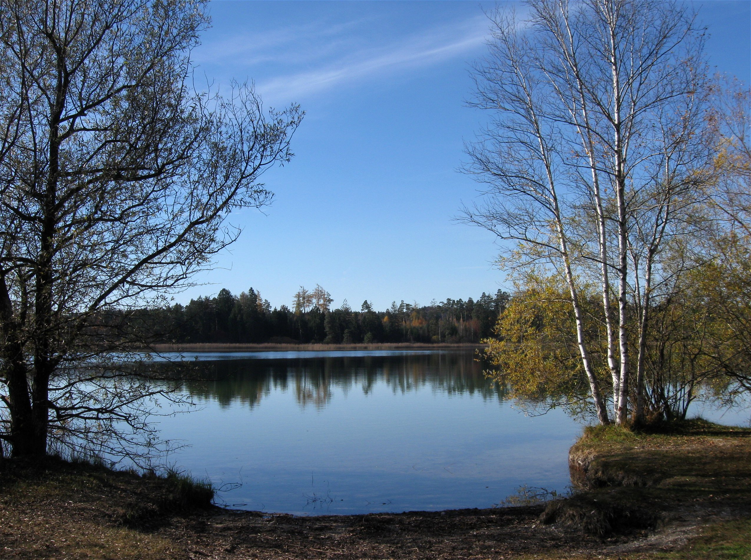 Fohnsee, Osterseen